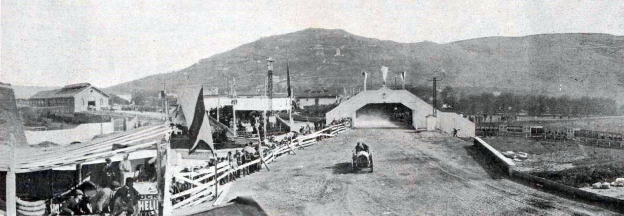 Panoramique des tribunes de la seconde Coupe de Brescia, organisée en juillet 1907.